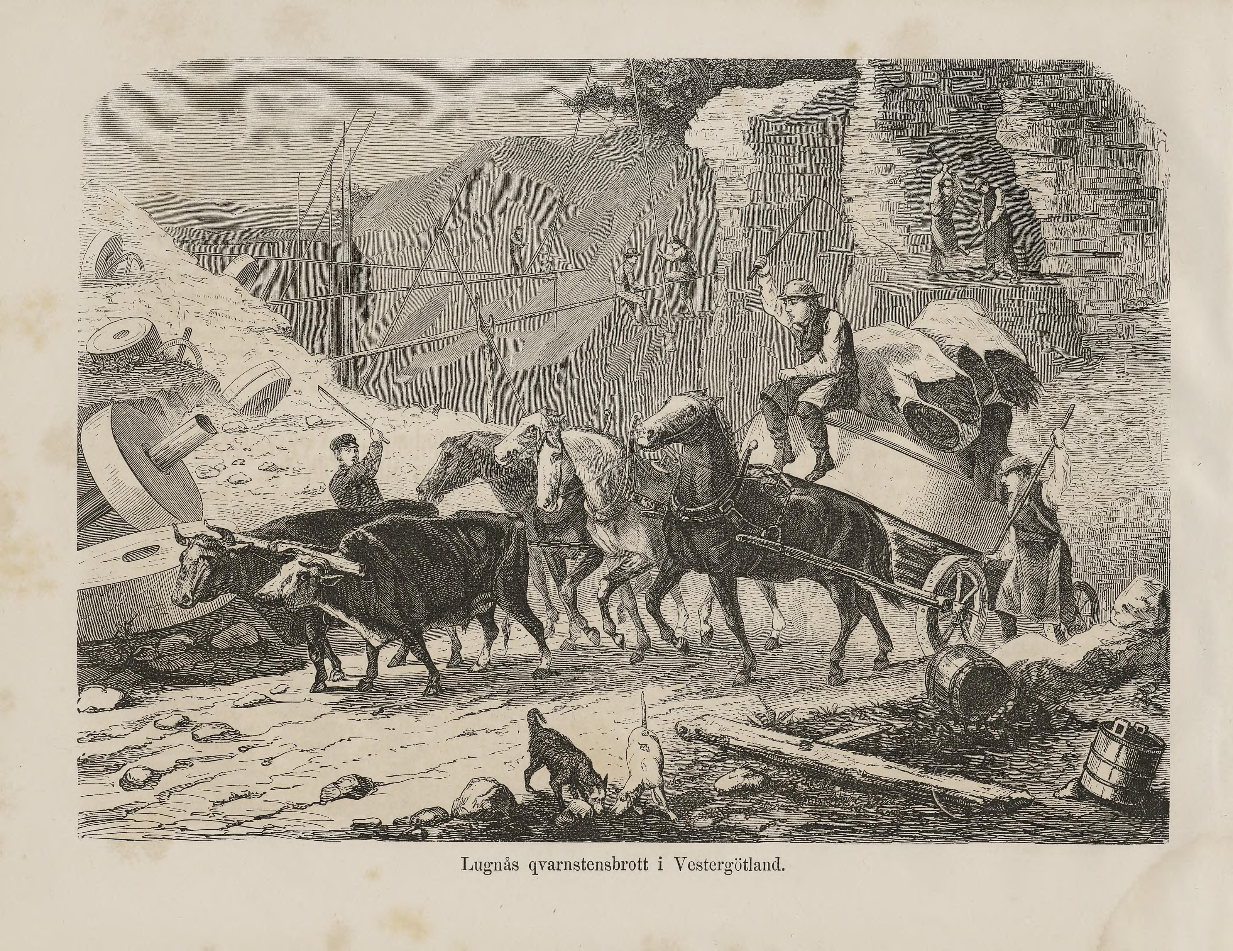 Illustrasjon hentet fra boken Nordiska taflor av ukjent forfatter og utgitt av Albert Bonnier (se, 1870)